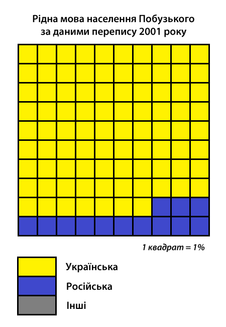 Інфографіка розподілу населення смт Побузьке Голованівського району за рідною мовою згідно з даними перепису 2001 року. Джерело: Розподіл населення Кіровоградської області за рідною мовою (у % до загальної чисельності населення) за переписом 2001 року